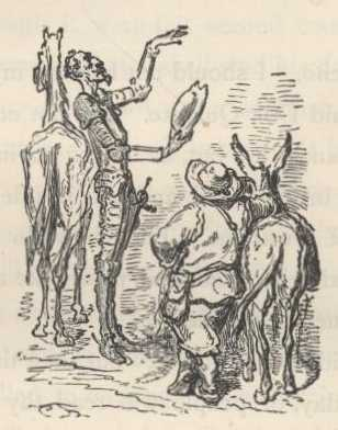 Dom Quixote enaltece a sua conquista do elmo de Mambrino observado por Sancho Pança